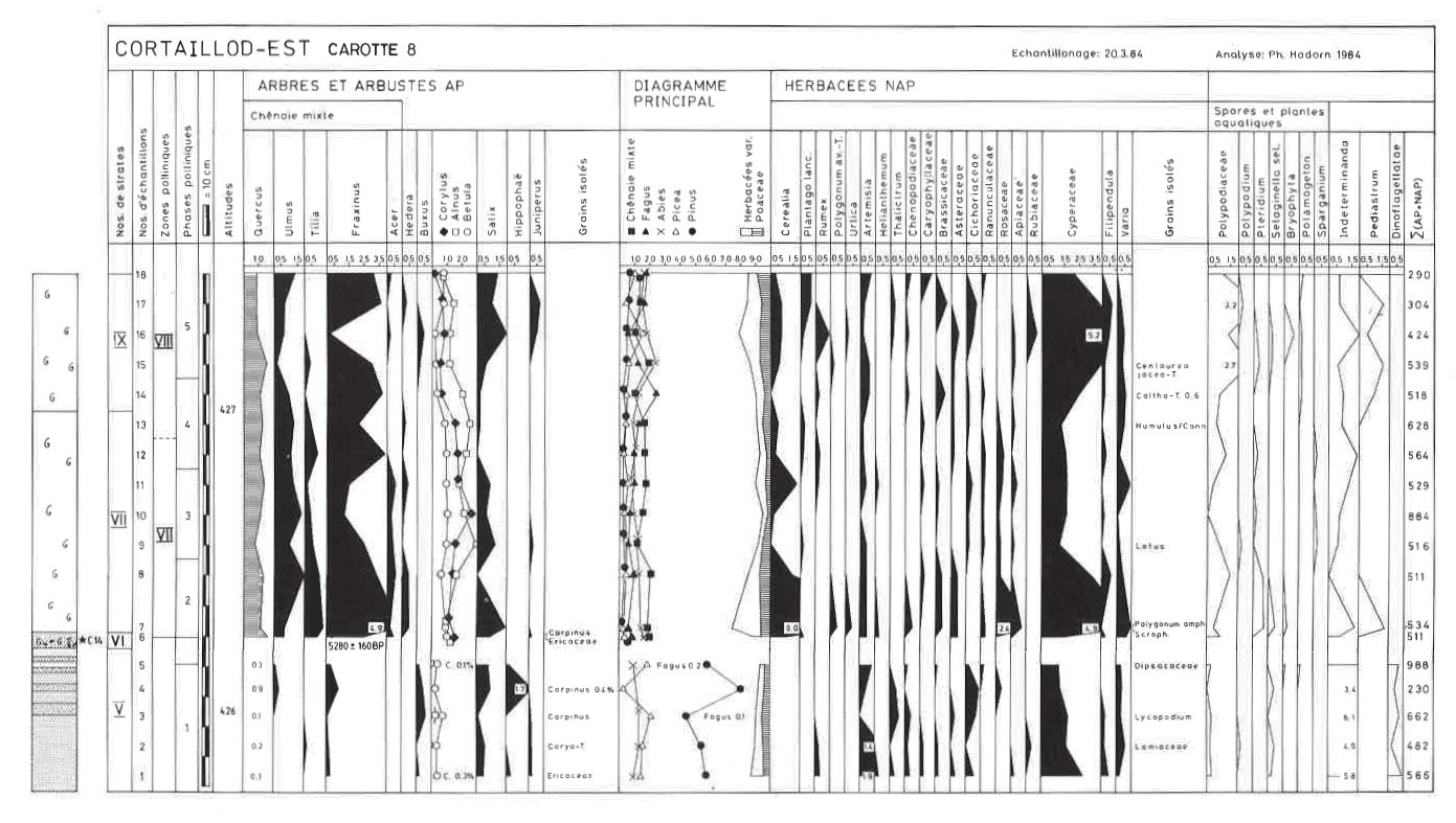 Diagramme polinique du site de Cortaillod-Est (Carotte N° 8) Tiré de BORRELLO M., BROCHIER J. & CHAIX L. & HADORN P. 1986 : Cortaillod-Est, un village du Bronze final 4. Nature et environnement Ed. du Ruau, Saint-Blaise. p. 41